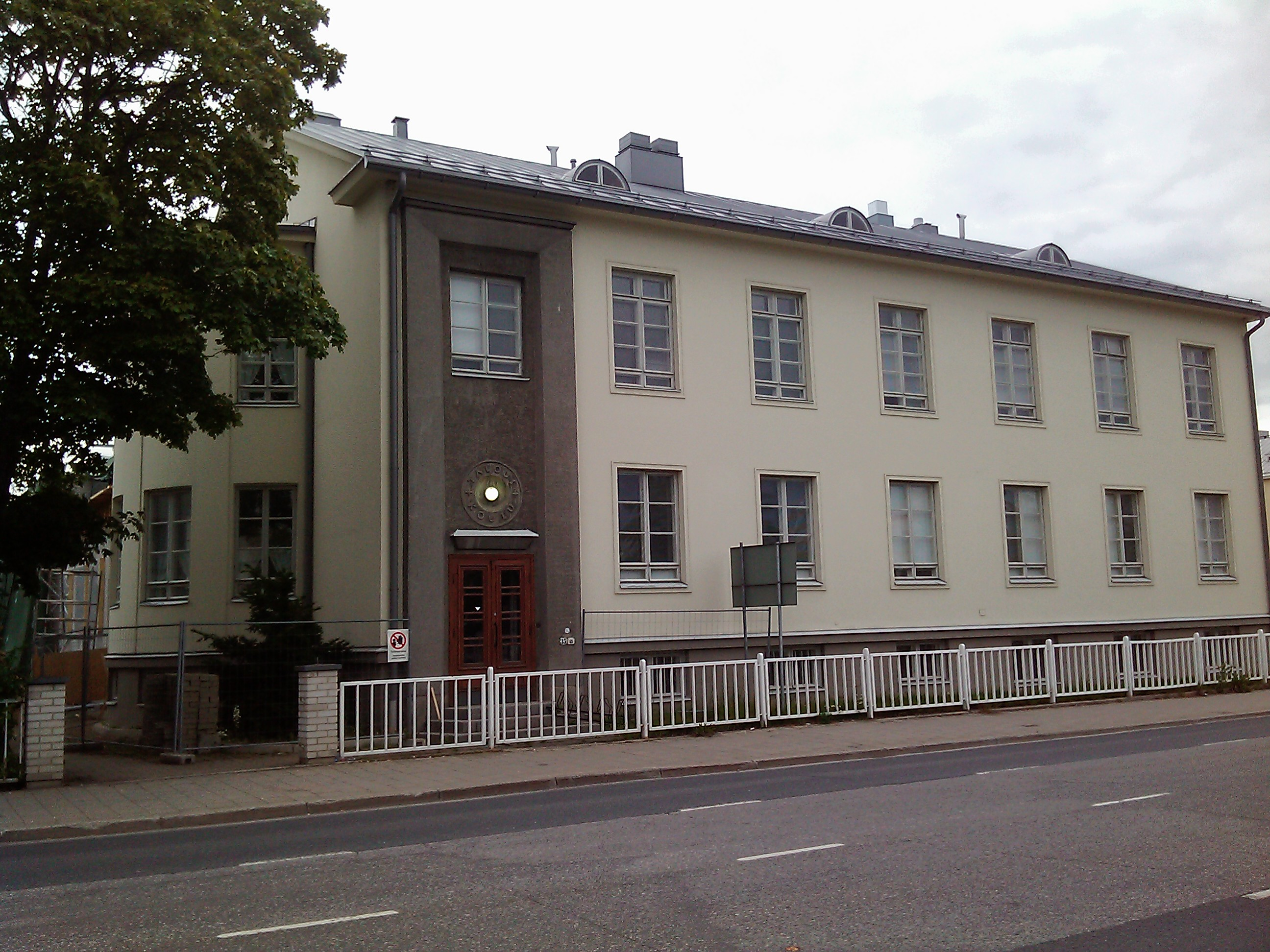 Joensuun talouskoulu